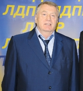 Владимир Жириновский и Михаил Дегтярёв